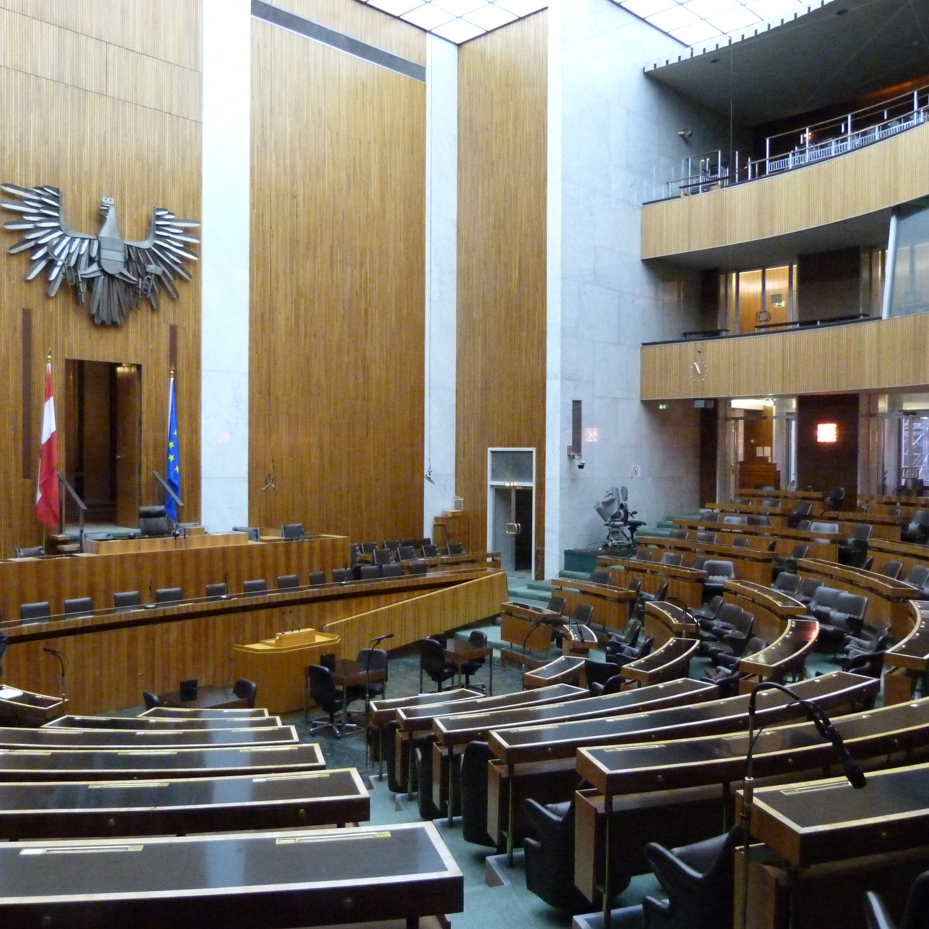 A felvétel 2014. december 3-án, szerdán készült. Bécs, Ausztria. Parlament. ©© Derzsi Elekes Andor, Budapest, 2014, A kép egészben, vagy részletekben másolását, bármilyen úton történő sokszorosítását és felhasználását a szerző ellenérték nélkül, jogutódjaira is kihatóan megengedi. Az engedély kiterjed a kereskedelmi célú hasznosításra is. Kéri azonban nevének feltüntetését a felhasználás során. A Metapolisz sorozat valamennyi képe és filmje Creative Commons alatti valamint kereskedelmi - for profit - célra is felhasználható. Ajánlott hivatkozás: Derzsi Elekes Andor: Metapolisz DVD line